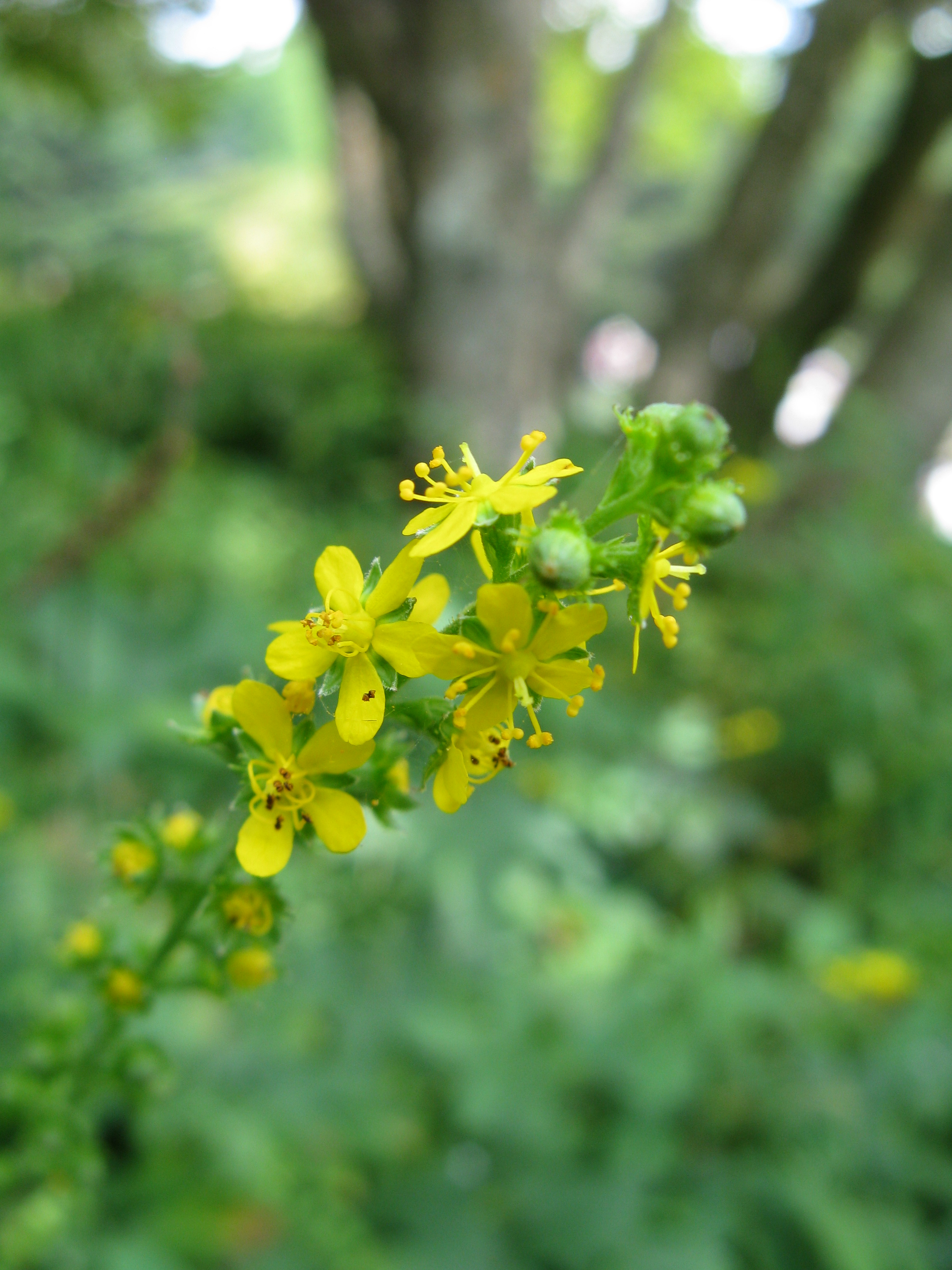 Scientific name Agrimonia pilosa